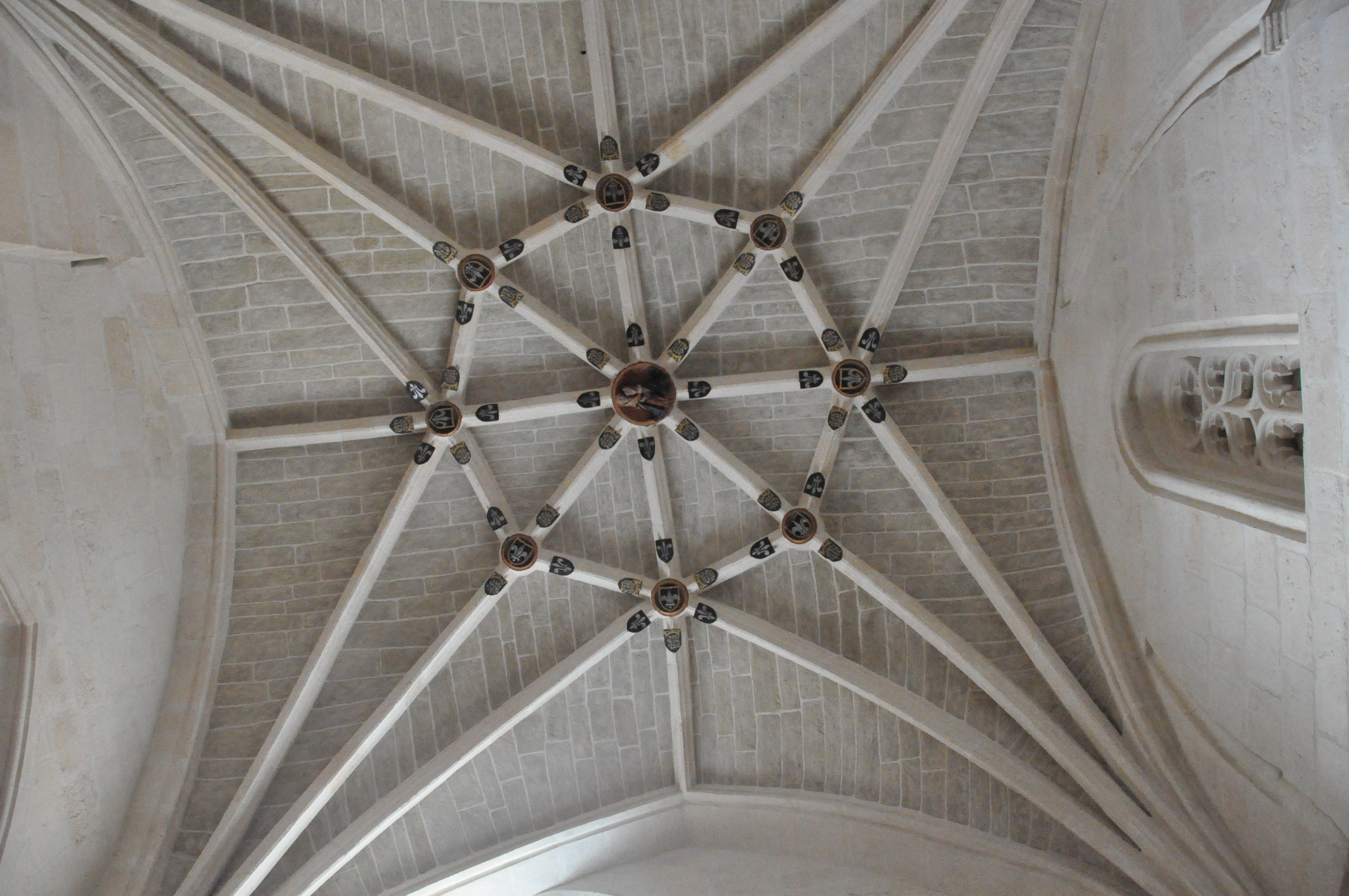 Una de las dos bóvedas de la Capilla de la Visitación de la catedral de Burgos;probablemente fue diseñada por Juan de Colonia